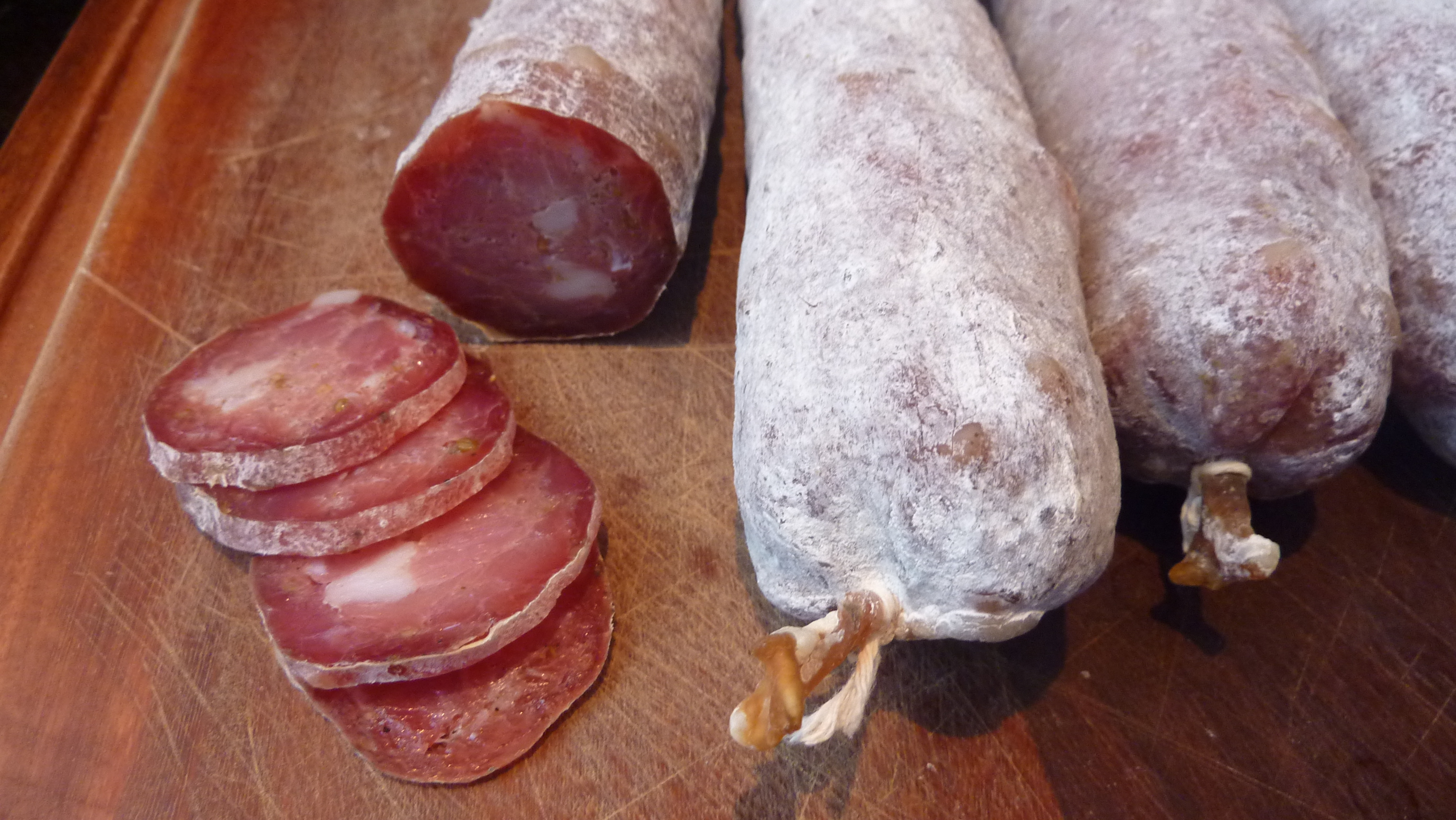 Salame Italiano Toscano Finocchiona feito artesanalmente para publicação em